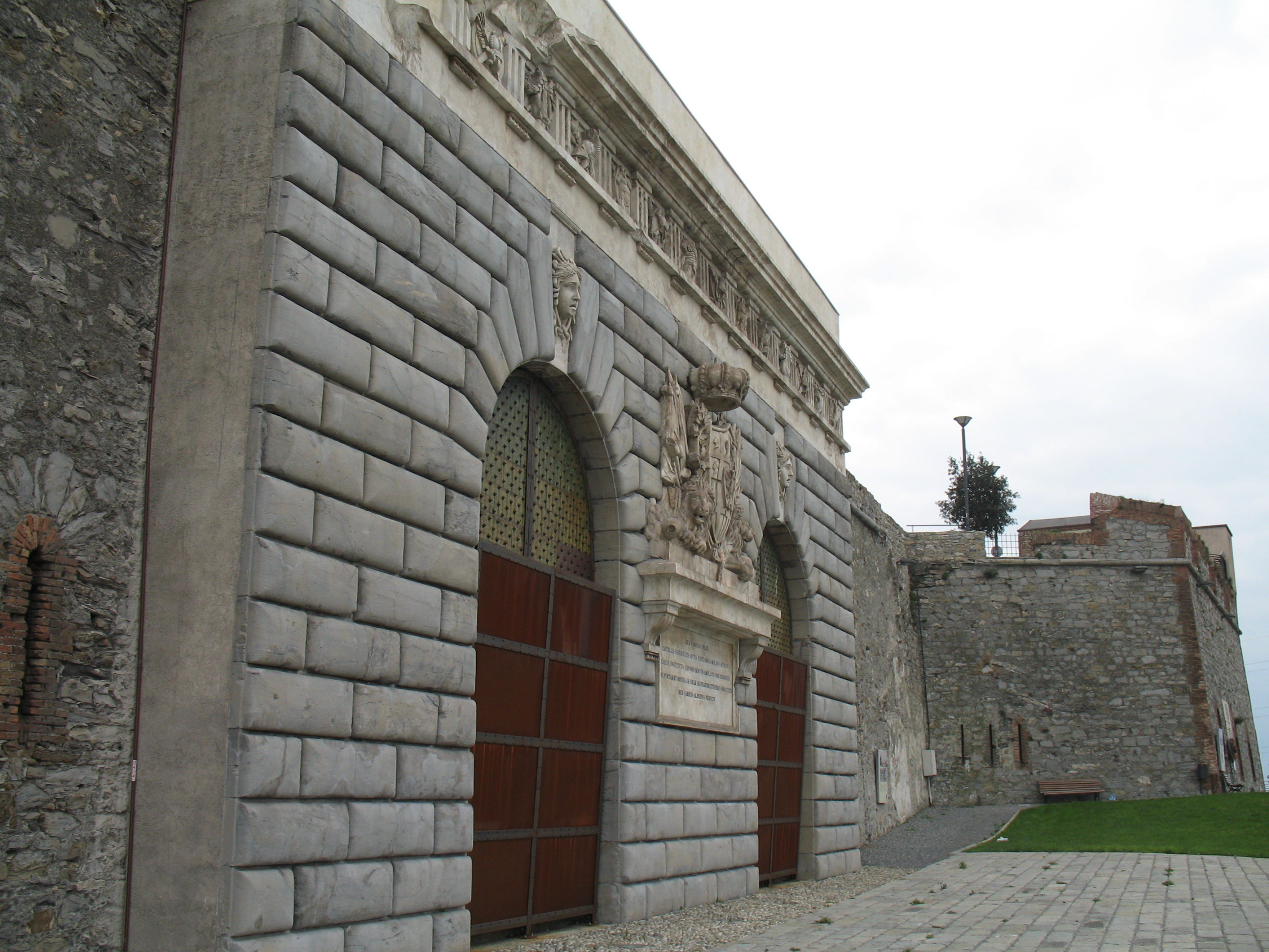 Immagine dalla Lanterna di Genova (passeggiata, fortificazioni, museo della Lanterna) Lanterna - Mura - Porta Nuova